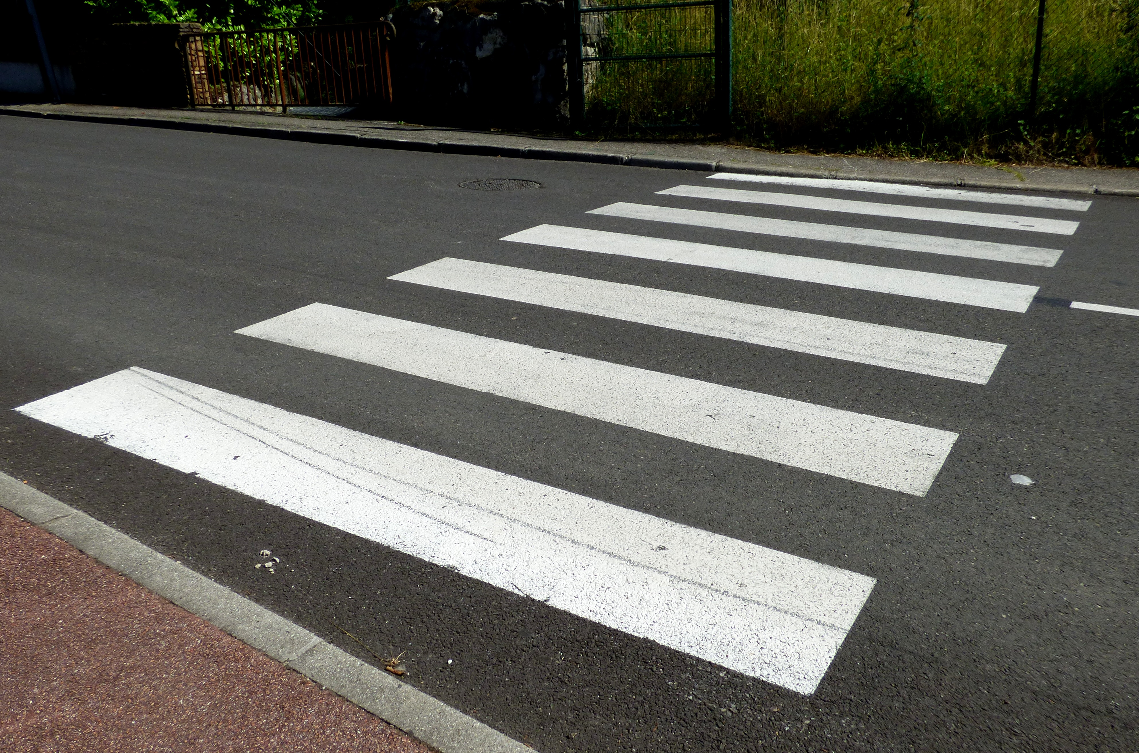 Un passage pour piétons matérialisé au sol sur une route communale à Aix-les-Bains.